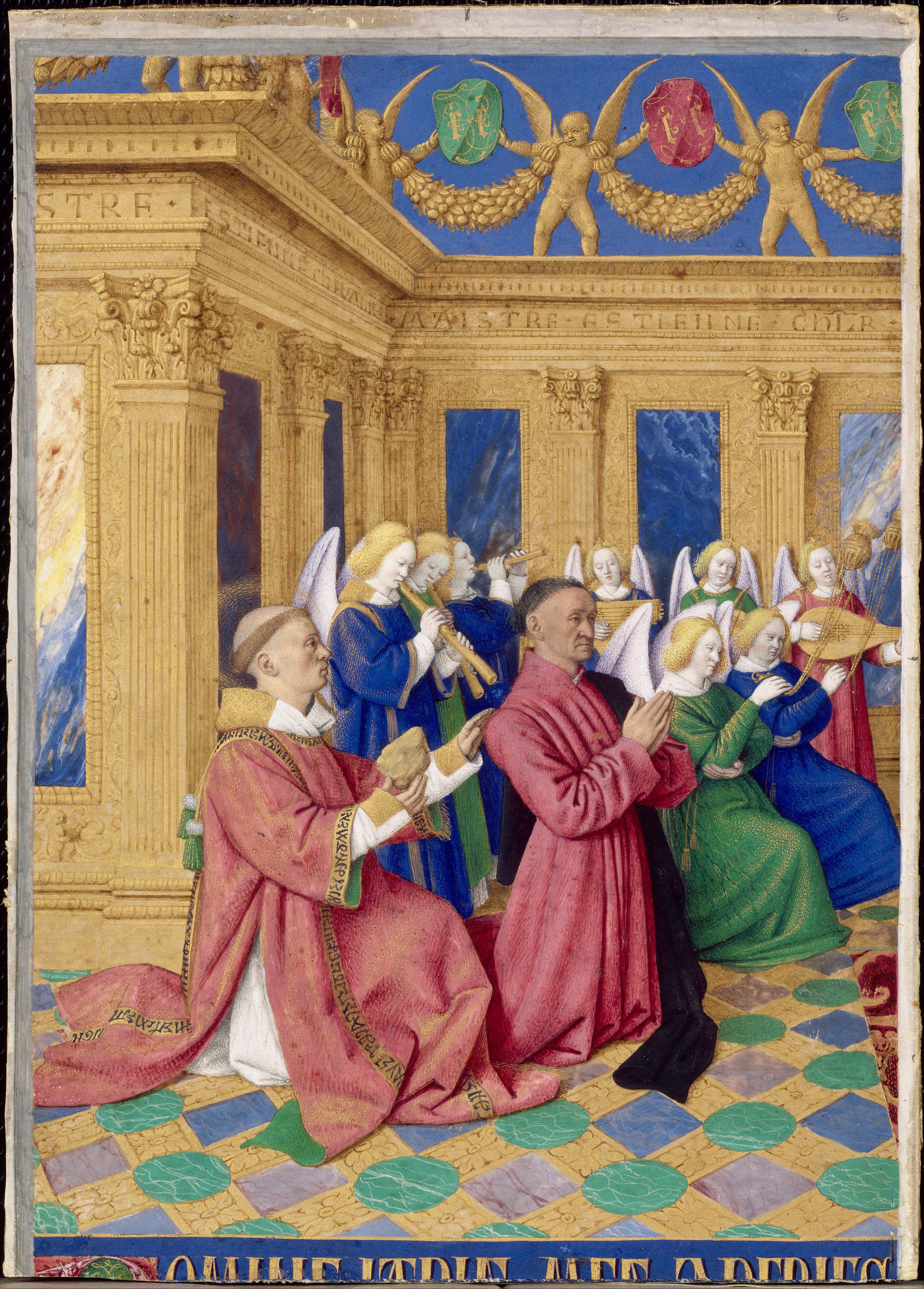 Étienne Chevalier agenouillé et saint Étienne derrière lui, posant la main sur son épaule et tenant de l'autre la pierre, symbole de son martyr. Ils sont entourés d'anges et sont tournés vers la Vierge et l'Enfant, présente sur l'autre miniature. Miniature décorant autrefois l'office des matines de la Vierge.